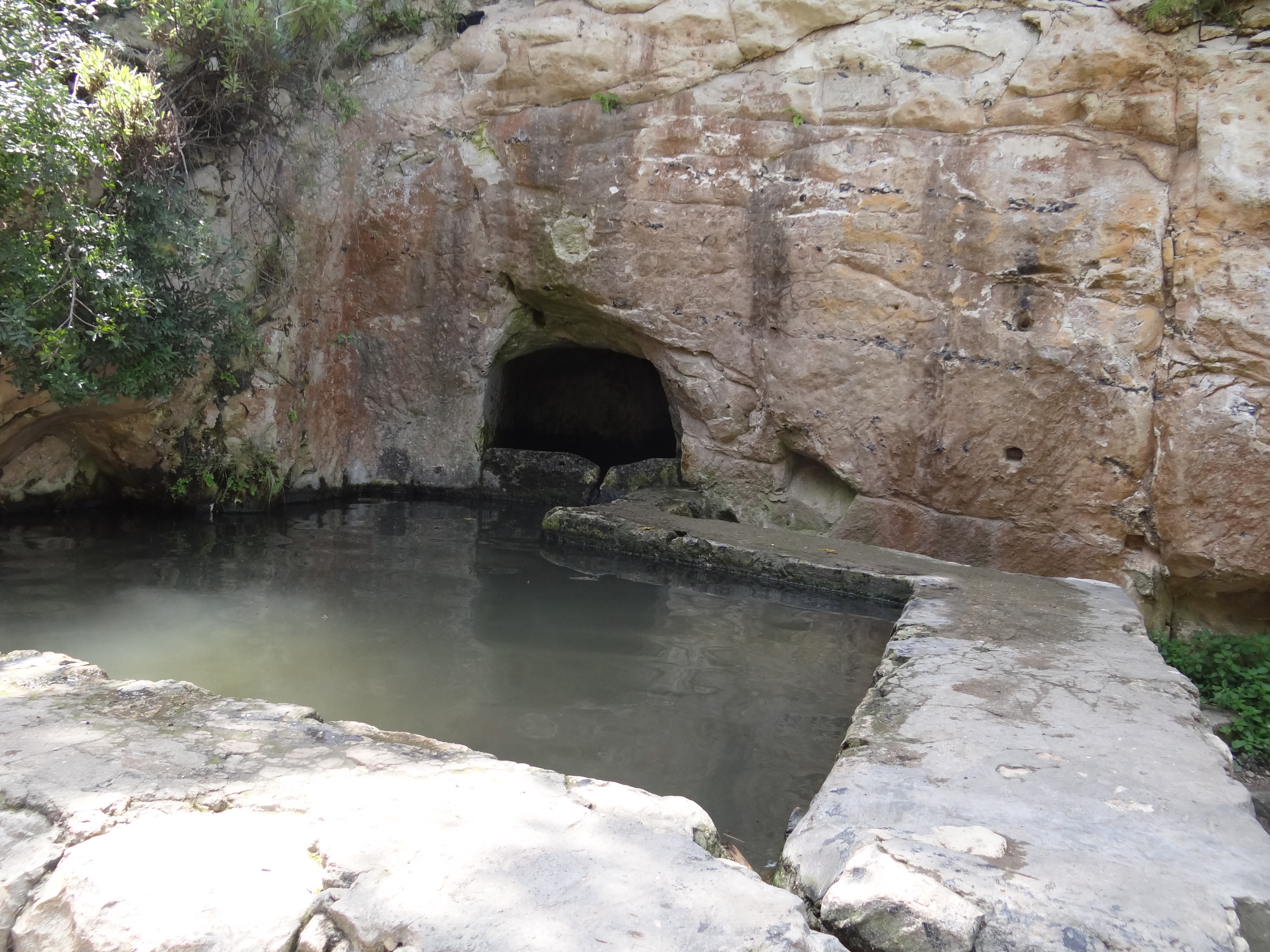 Wadi Siah, Haifa, Israel. נחל שִׂיחַ הוא נחל אכזב בצפון מערב הכרמל. ראשיתו בתוככי העיר חיפה ברחוב לוטוס שבשכונת כרמליה, והוא זורם מערבה לים התיכון. הנחל זורם בין שכונת כבאביר המשמשת כמרכז למוסלמים ה [אחמדים בישראל ובין שכונת כרמליה. בנחל כנסיה כרמליתית מהמאה ה-13, שני מעיינות עין משוטטים ועין שיח, מערת קומתיים ששימשה את הכרמליתים, ובוסתן כיאט עין משוטטים